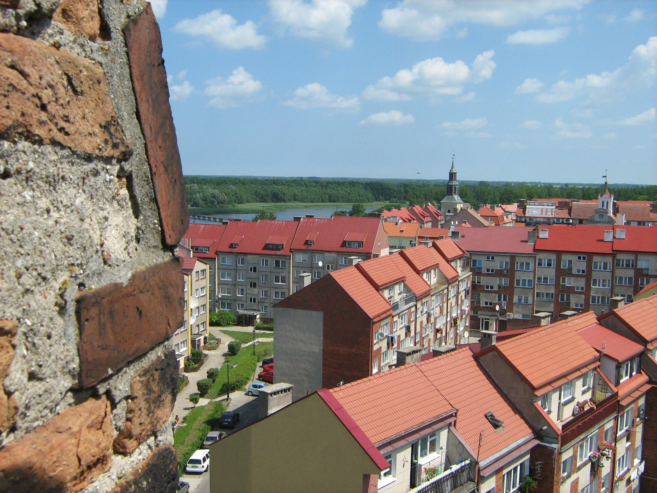 Kamień Pomorski, widok z baszty.